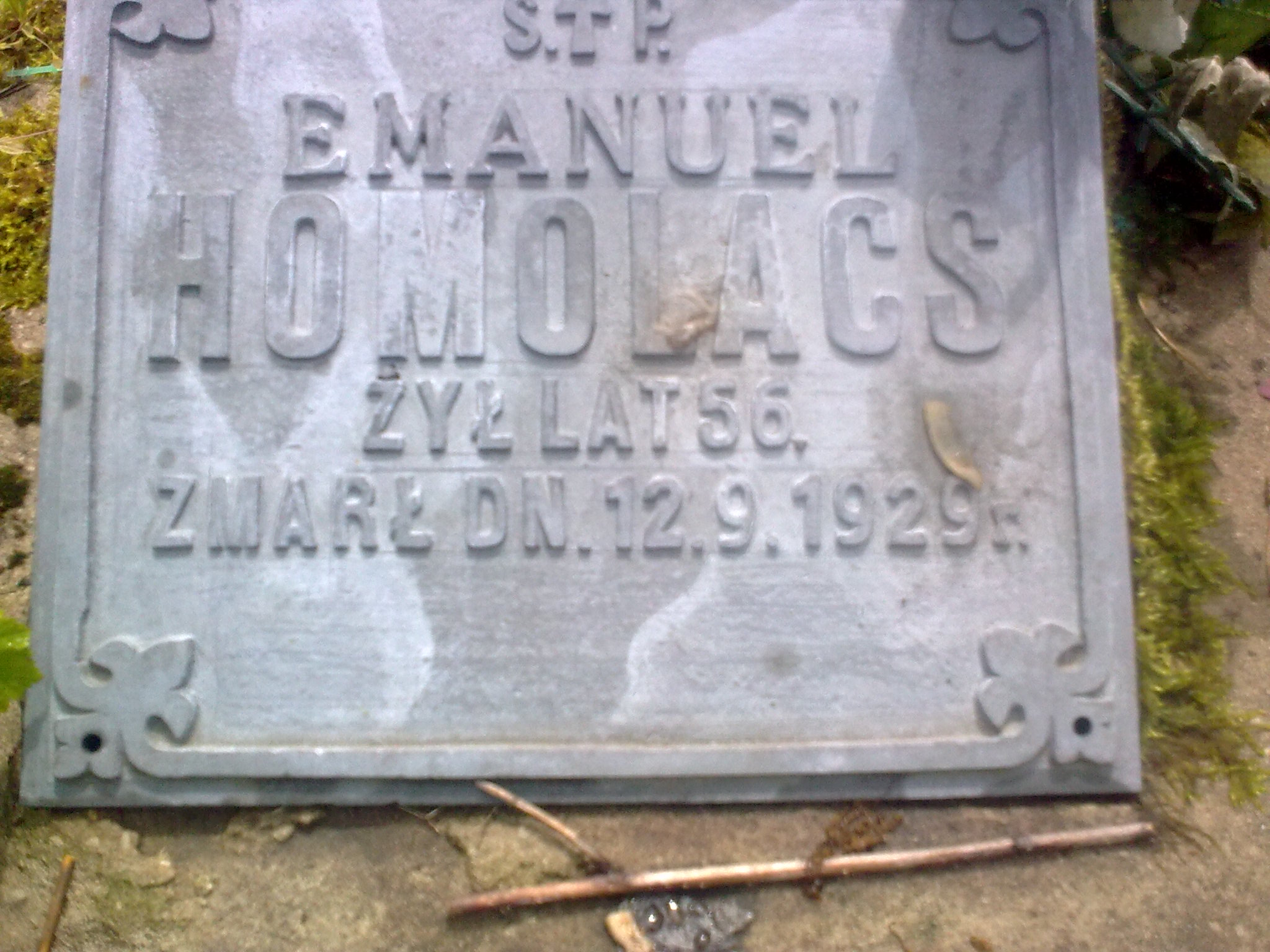 płyta nagrobna Emanuela Homolacsa na cmentarzu w Nieliszu